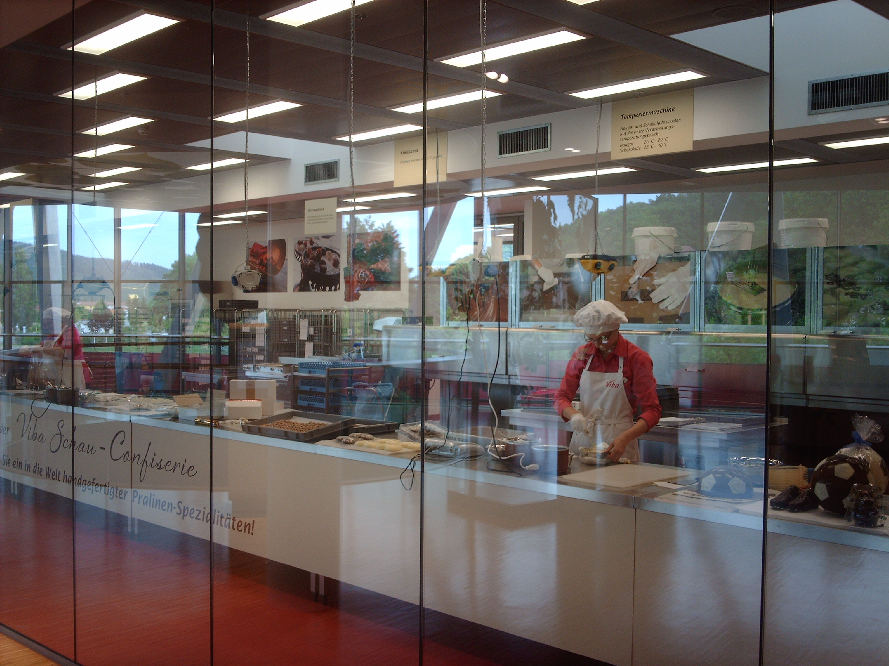 Viba Nougat-Welt in Schmalkalden 2